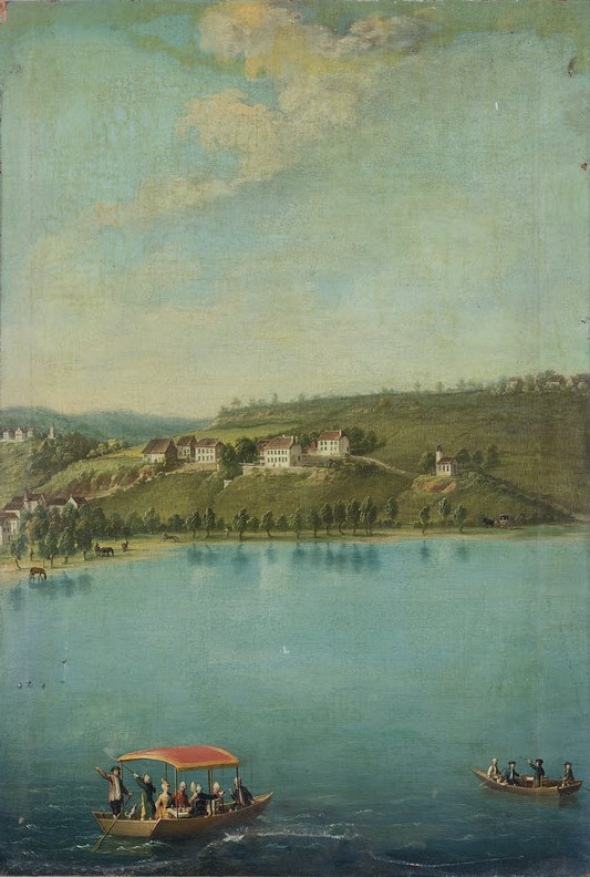 Spiegeloberbild, Spiegelrahmen ist Werkstatt der Johann Diwy-Gruner zuzuschreiben, vgl. Kehrli 2009, S. 181.